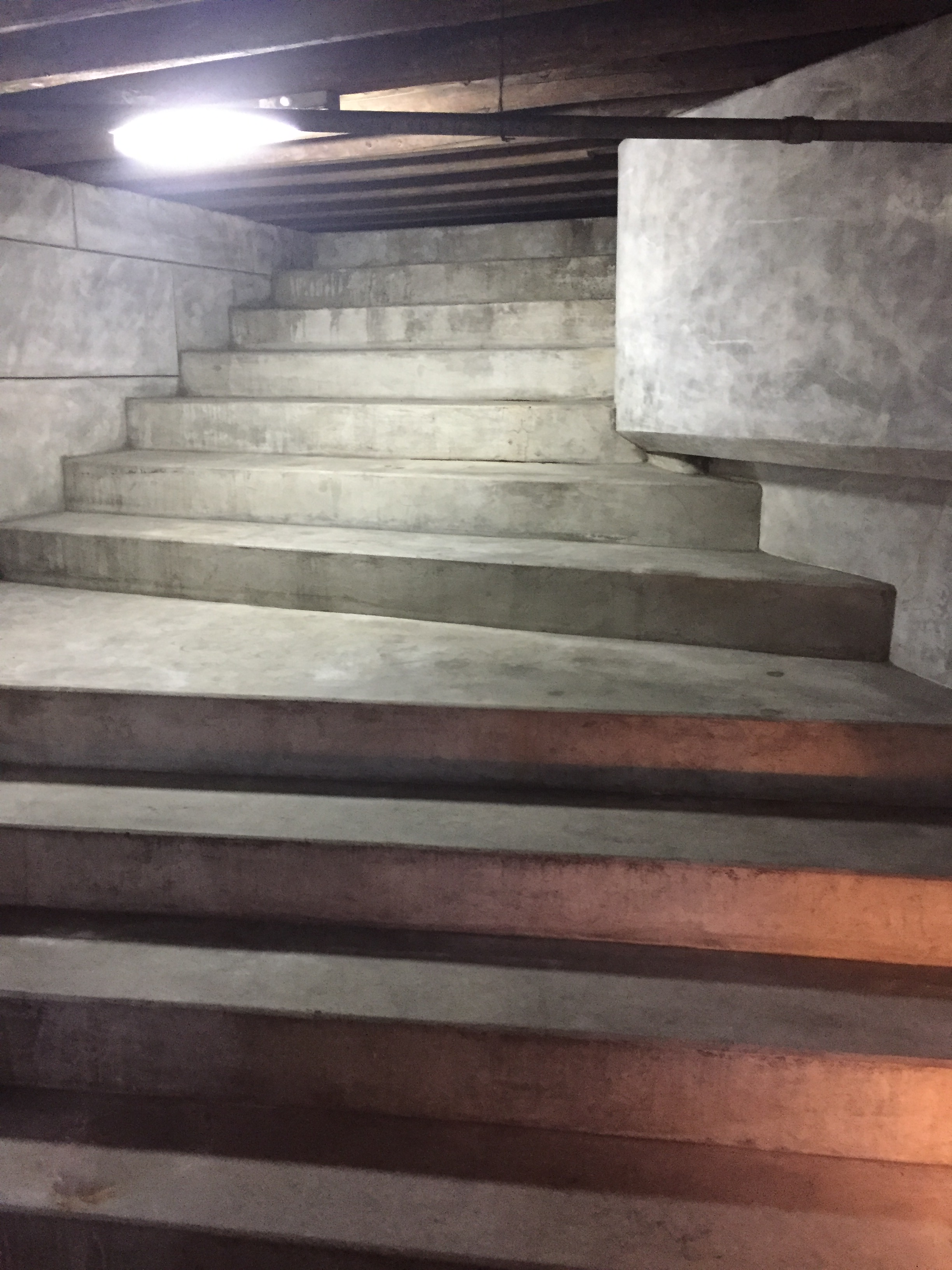 今治ラジウム温泉で、かつて1階浴場から2階ホールに接続していたと思われる階段の一部。モルタル壁面を大理石様に仕上げるマーブル技法がここでも見られる。浴場からここまで上がる階段は増築時になくなっており、当時どのように設置されていたのか明らかになっていない。 ※見学会で許可を得て撮影